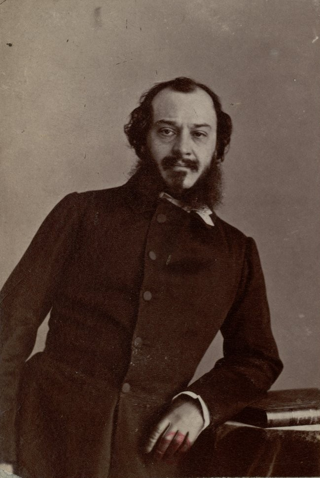 D'Héricault romancier catholique.